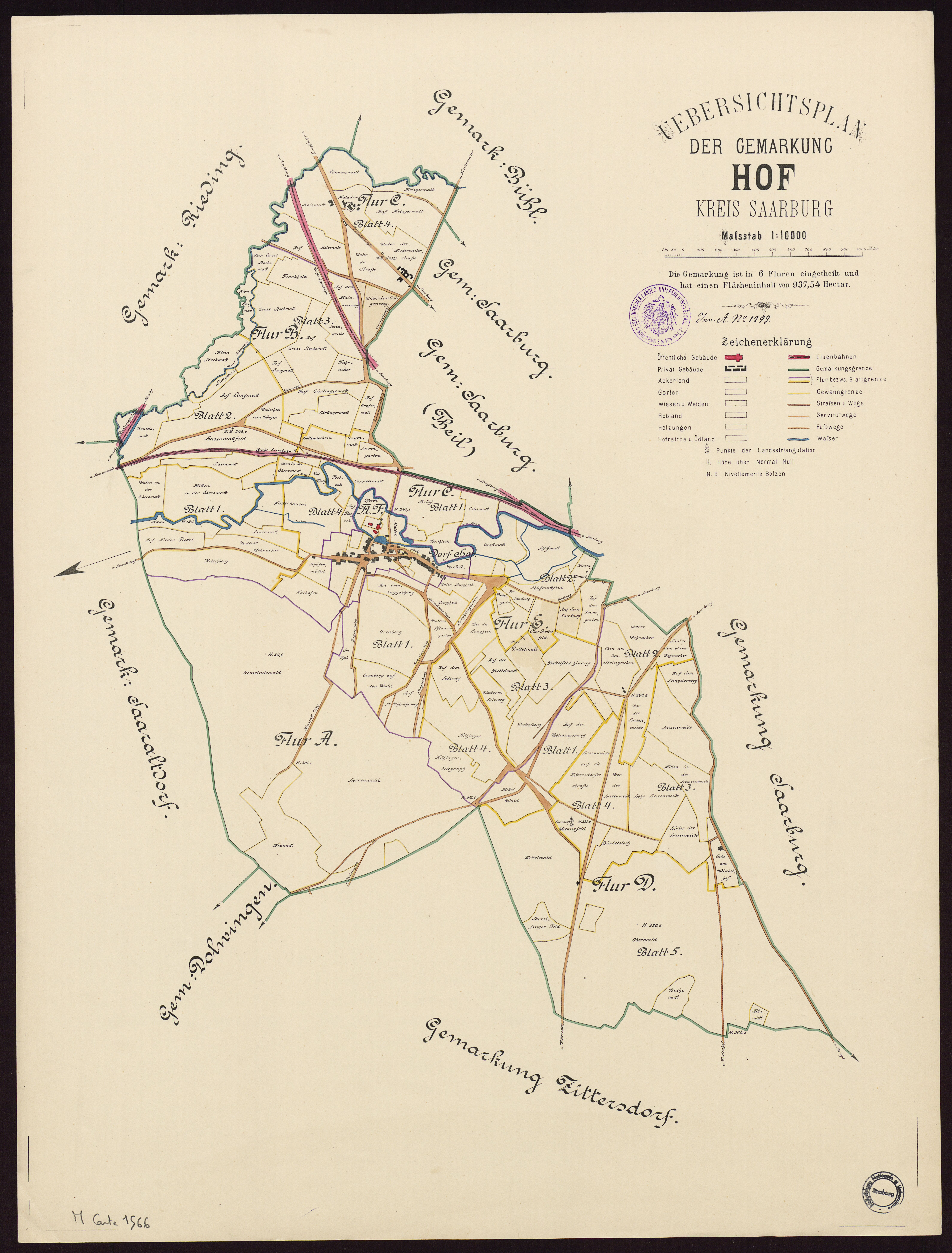 Plans cadastraux -- France -- Hoff (Moselle). Cadastre établi en 1825, revu en 1885.